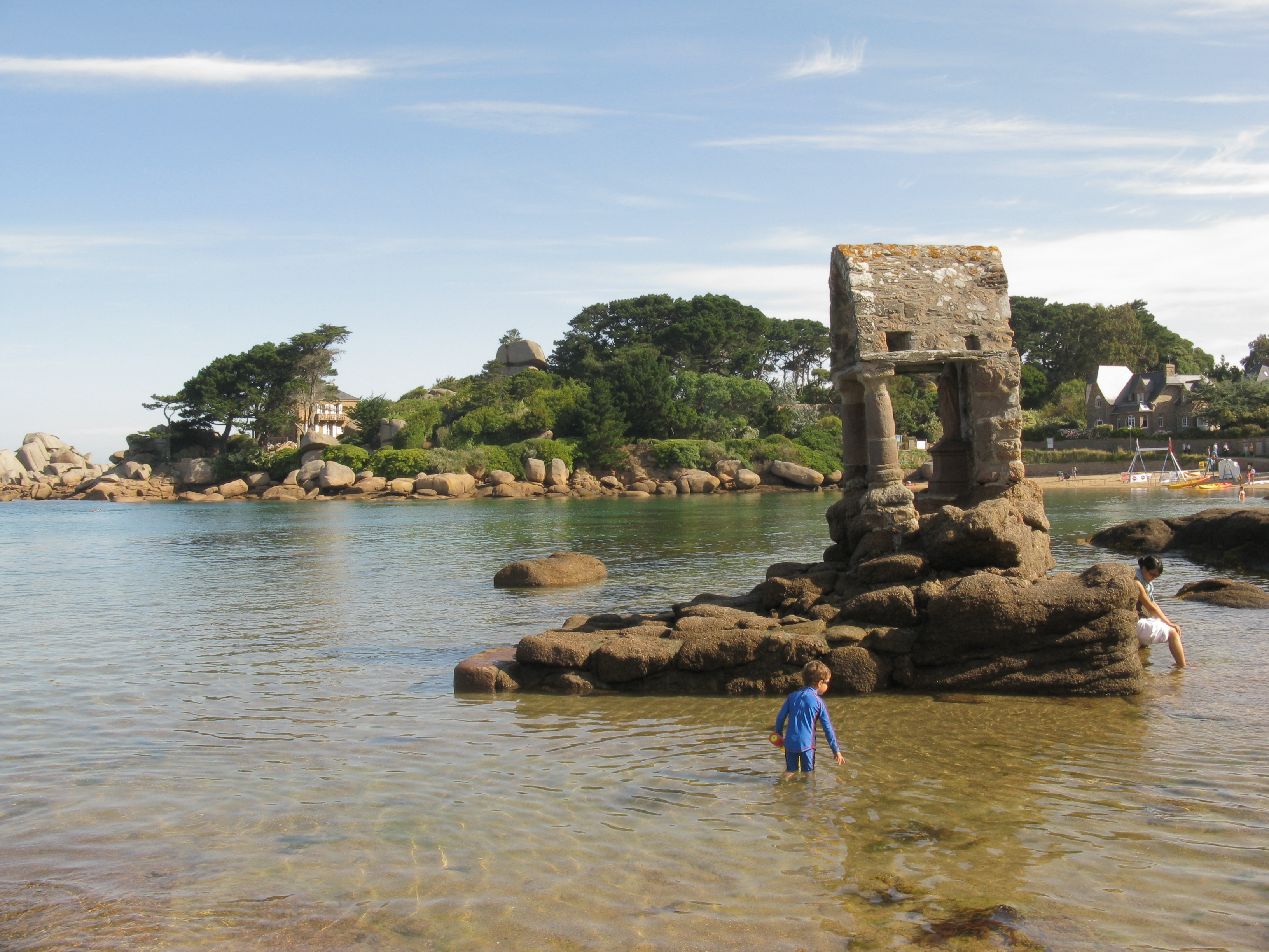 Plage de Saint-Guirec, Ploumanac'h, France